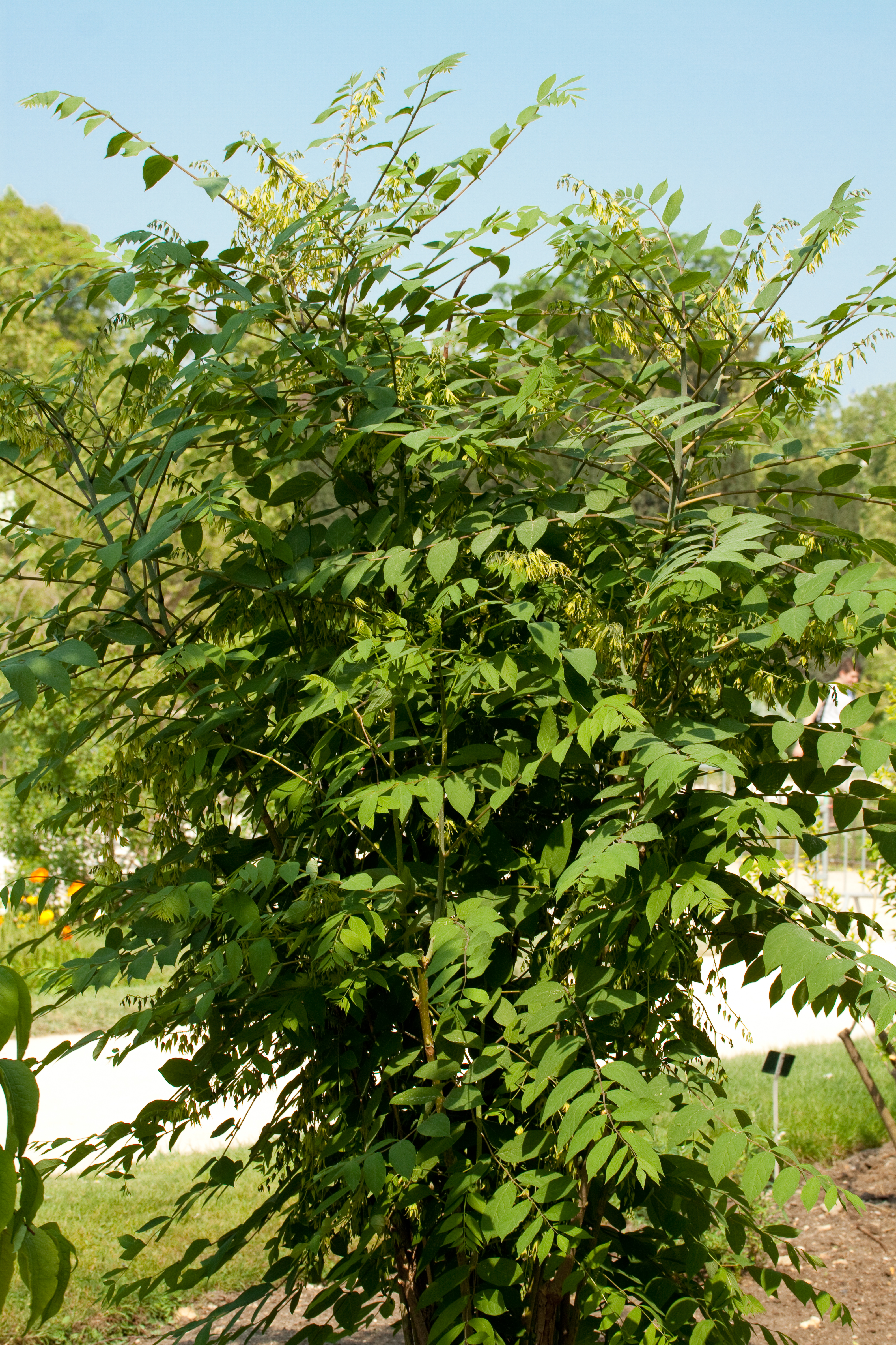 Vue générale de Decaisnea fargesii en floraison au Jardin des Plantes - Paris